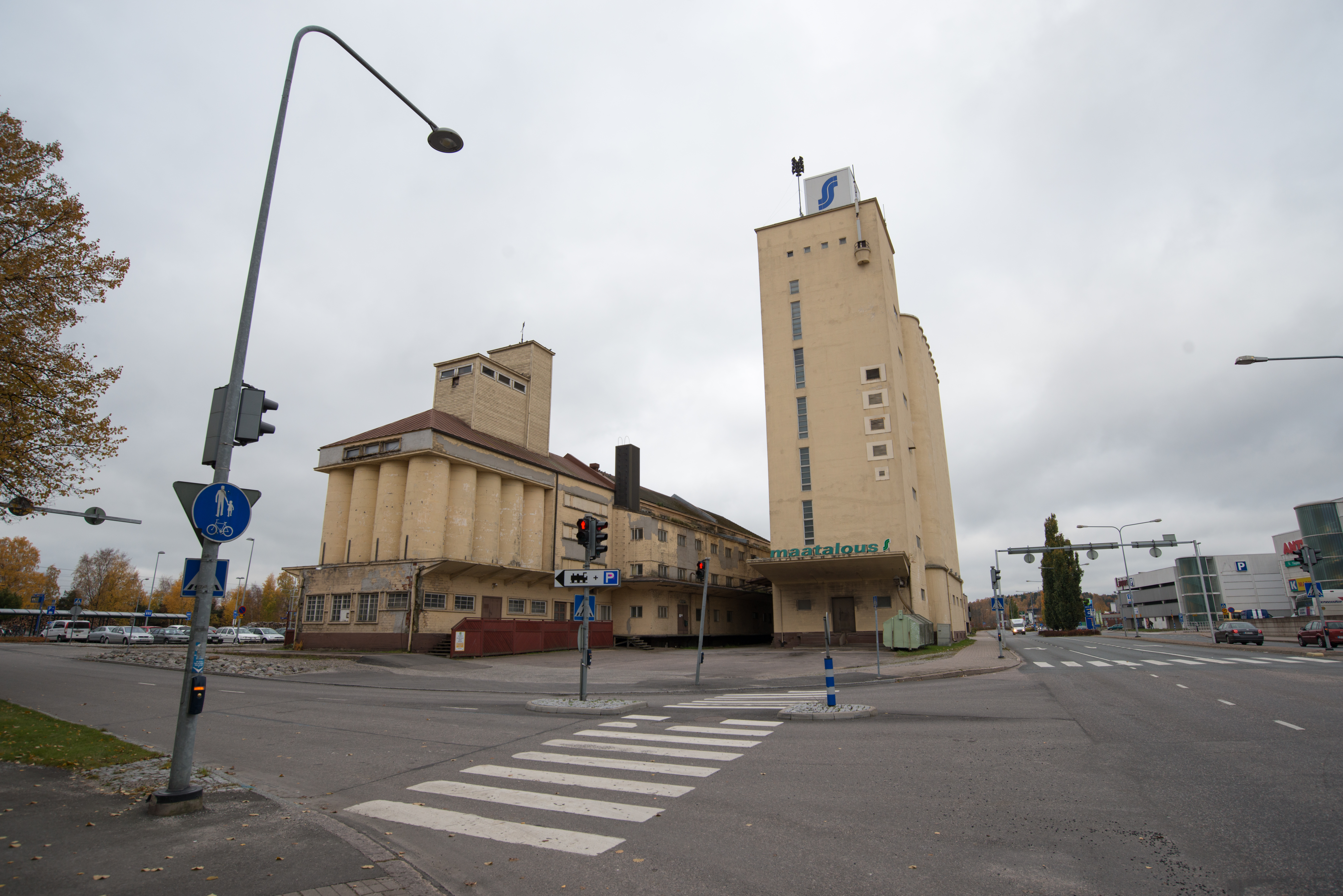 Salonn Seudun Osuuskaupan myllyrakennus